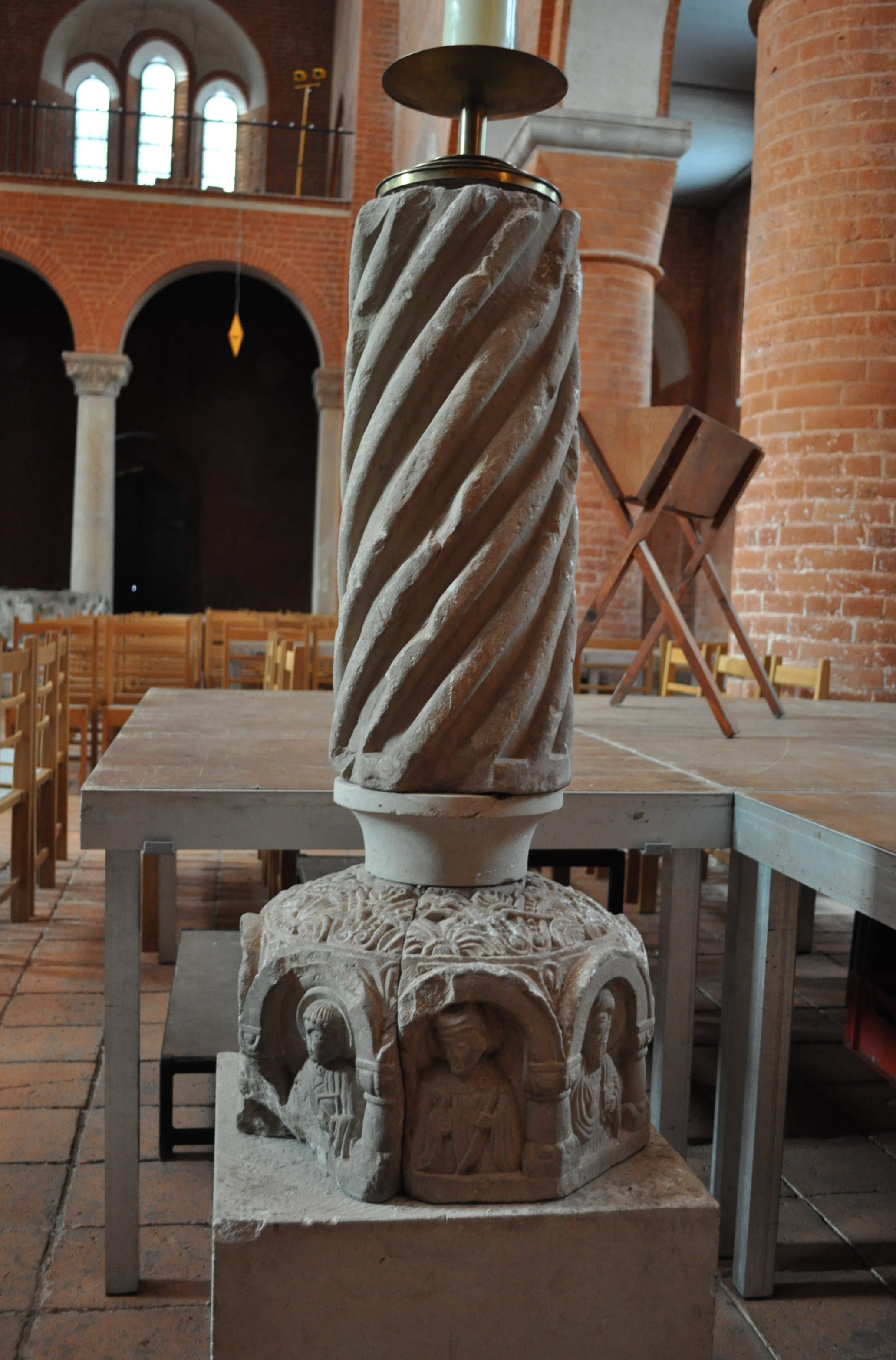 Kloster Jerichow